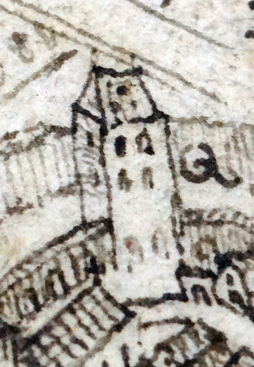 Luginsland, Worms. Detail aus: Peter Hamman: Ansicht der Stadt Worms nach der Zerstörung 1689 von Süden. Stadtarchiv Worms, Abt. 1B, Nr. 48.